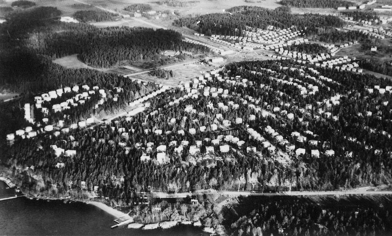 Flygfoto över Södra Ängby från söder, taget i slutet av 1930-talet. Blackeberg, i övre vänstre del är ännu helt obebyggd, längs ner i bild syns Ängbybadet. Bromma/Stockholm